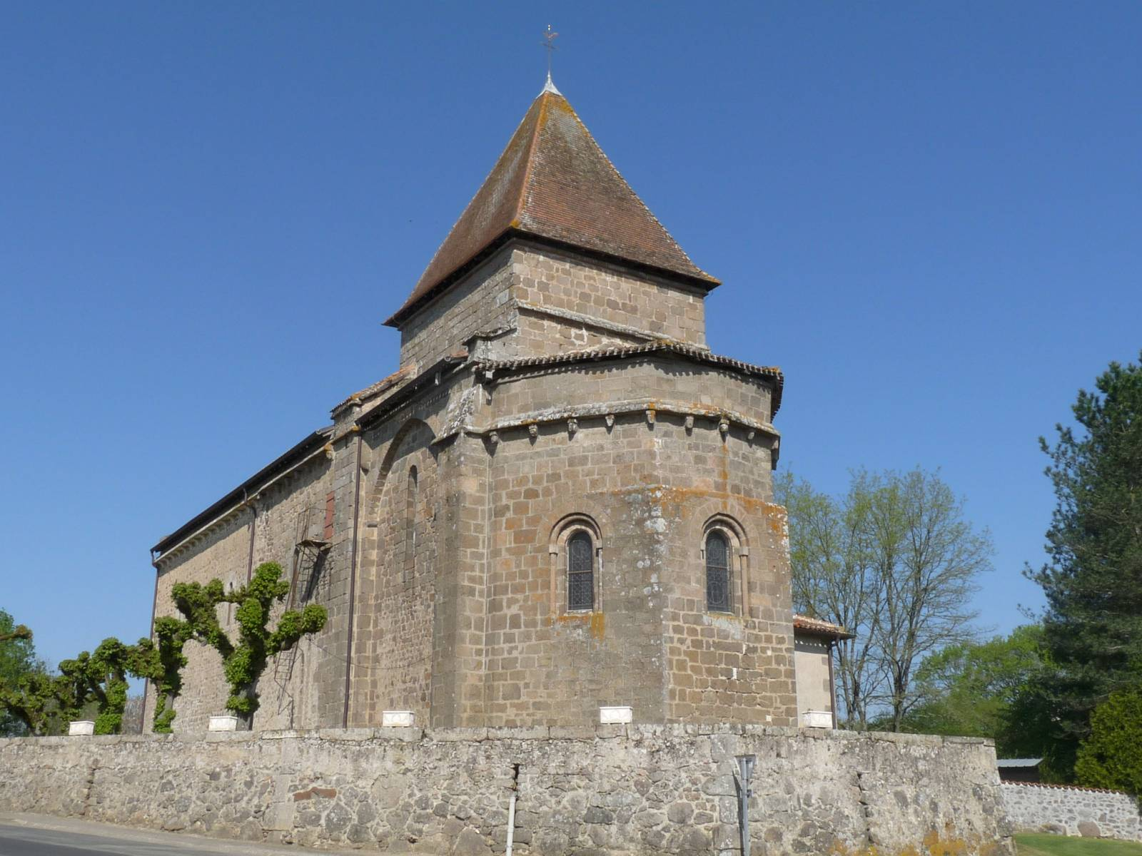 Eglise d'Oradour-Fanais, Charente, France